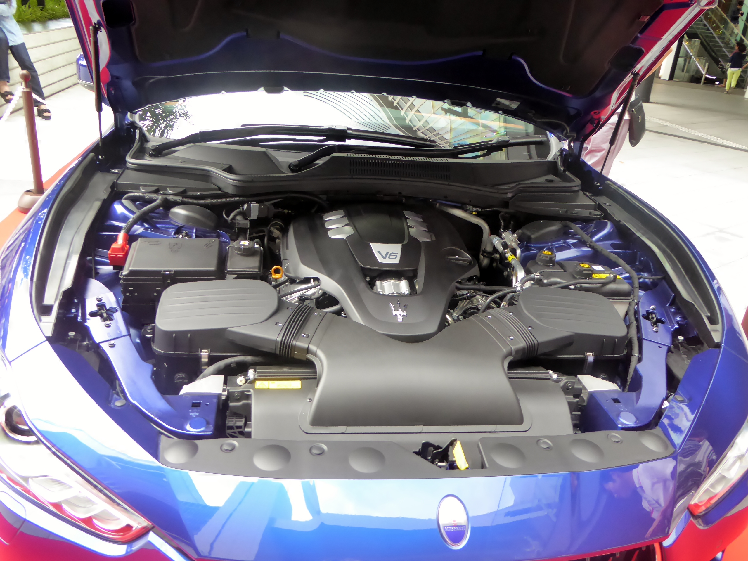 3代目マセラティ・ギブリのエンジンルームを撮影。